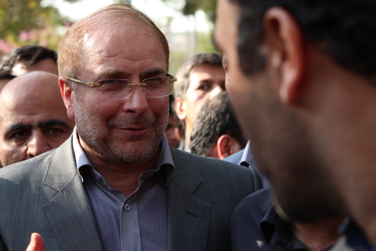 Dr.ghalibaf قالیباف شهردار تهران